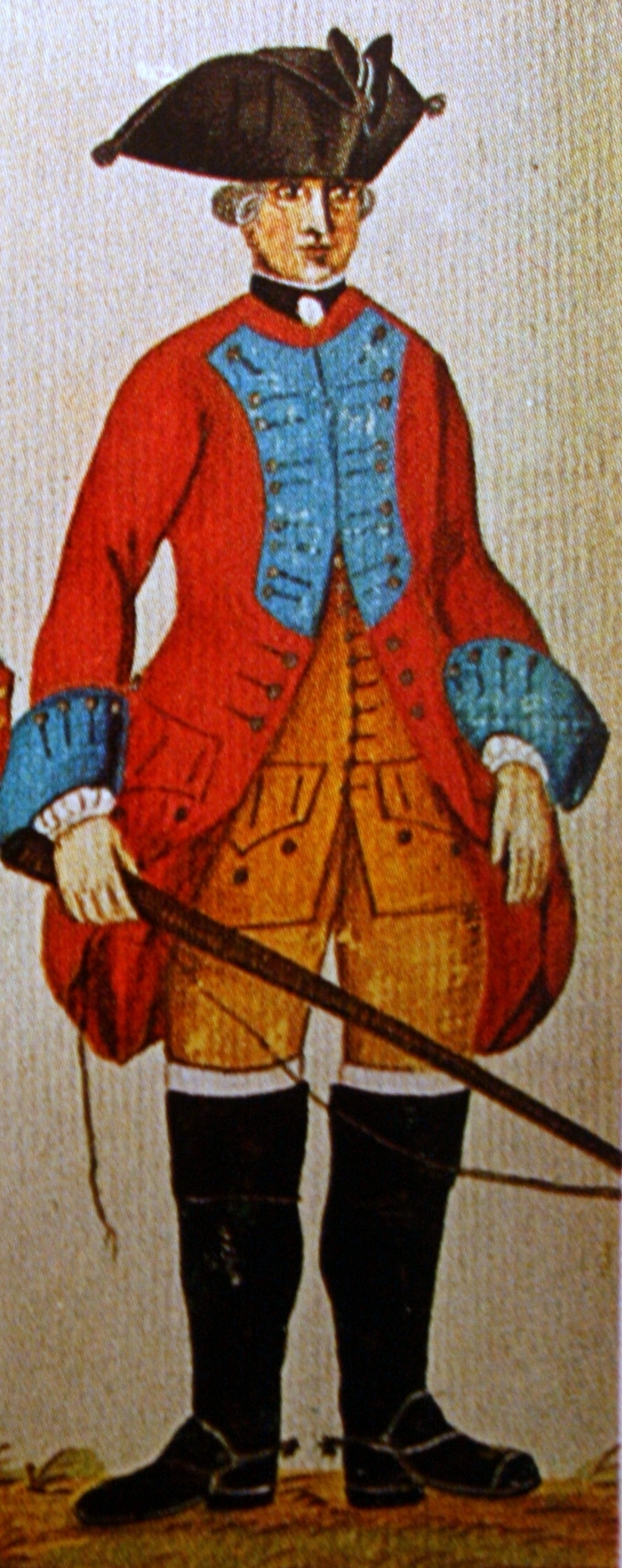 Trainknecht Gmundener Prachtwerk der kurhannoverschen Armee während des Siebenjährigen Krieges.